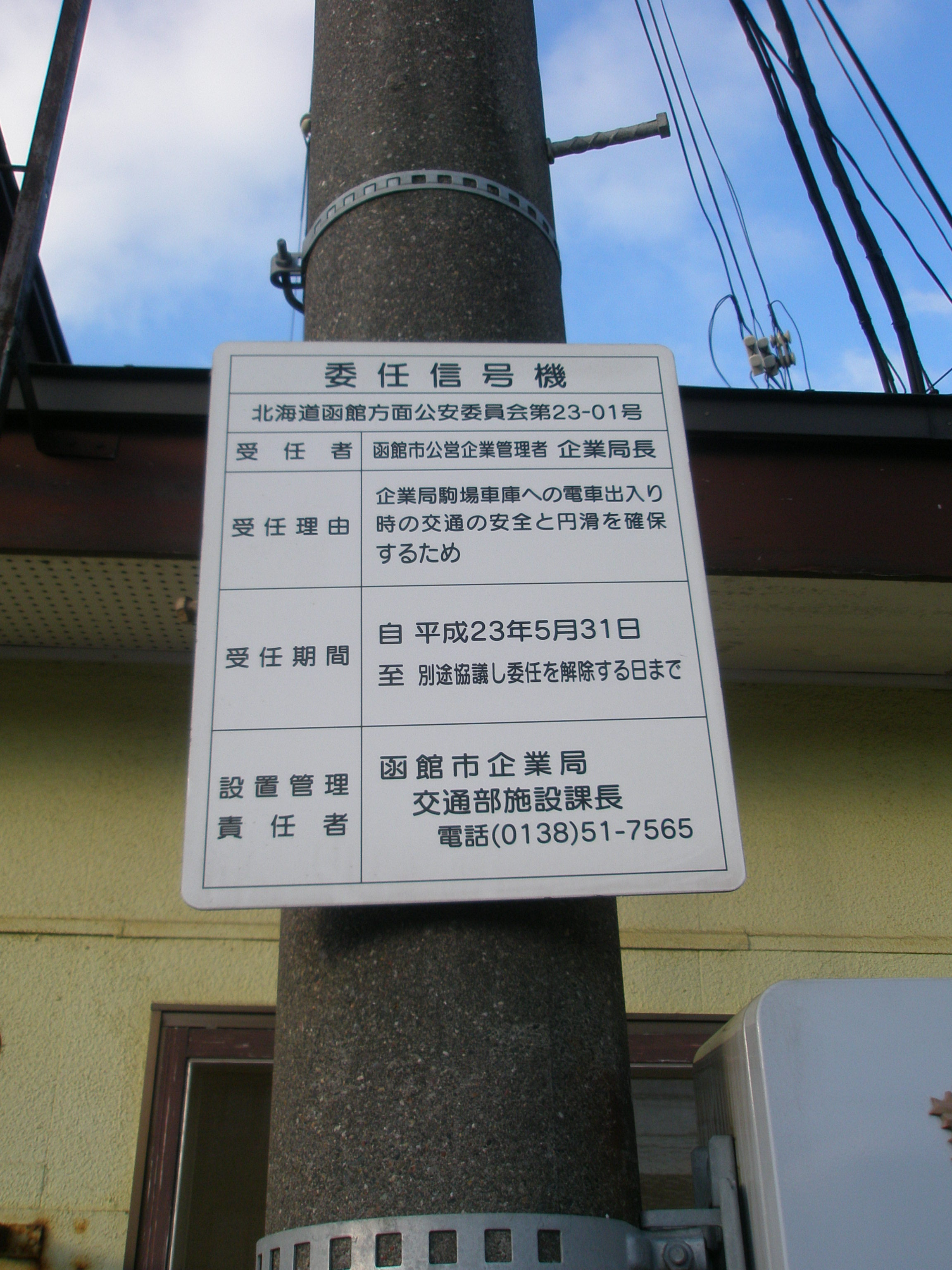 駒場車庫前に設置の信号が公安委員会より委任された事を示す表示板